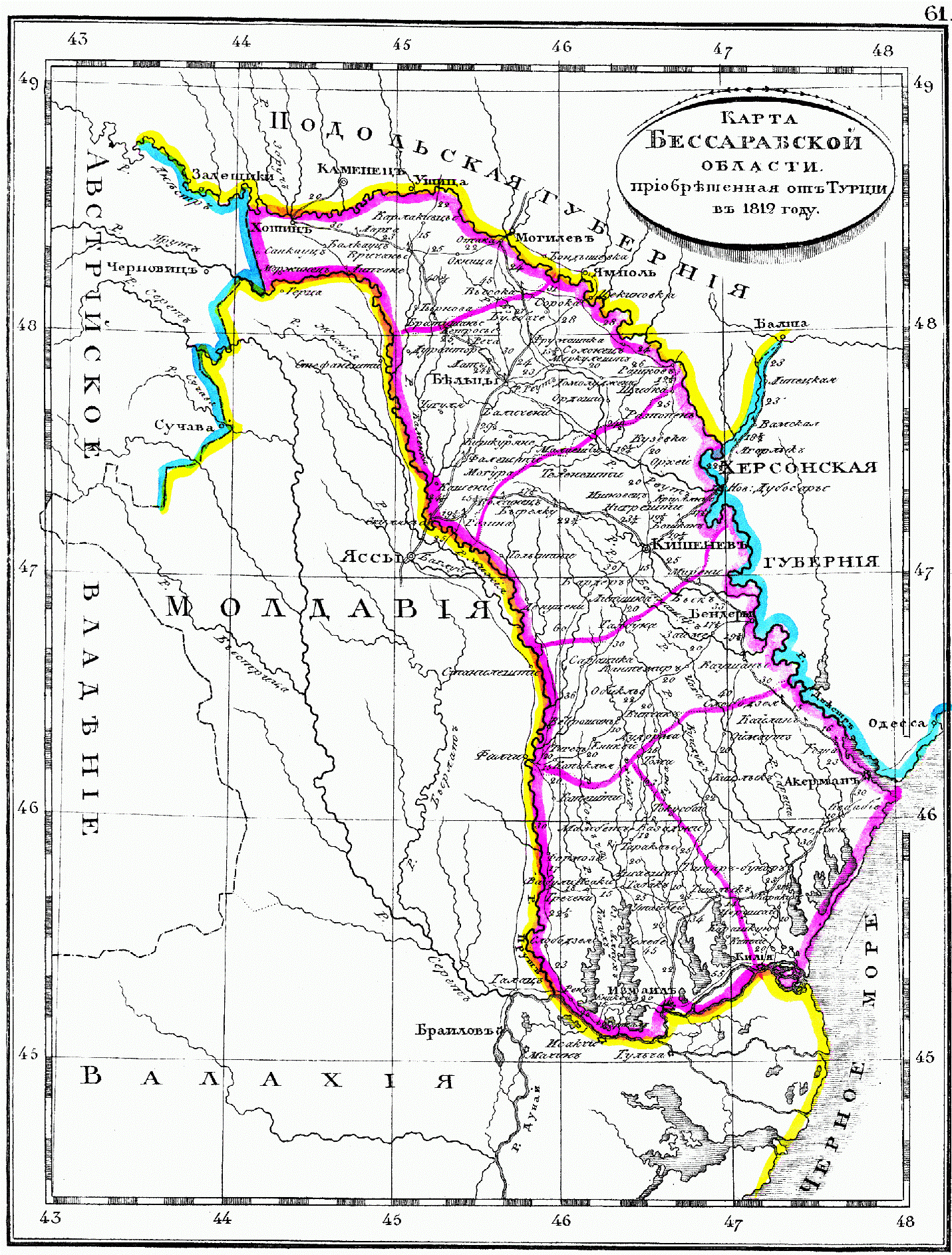 Карта Бессарабской области, 1835